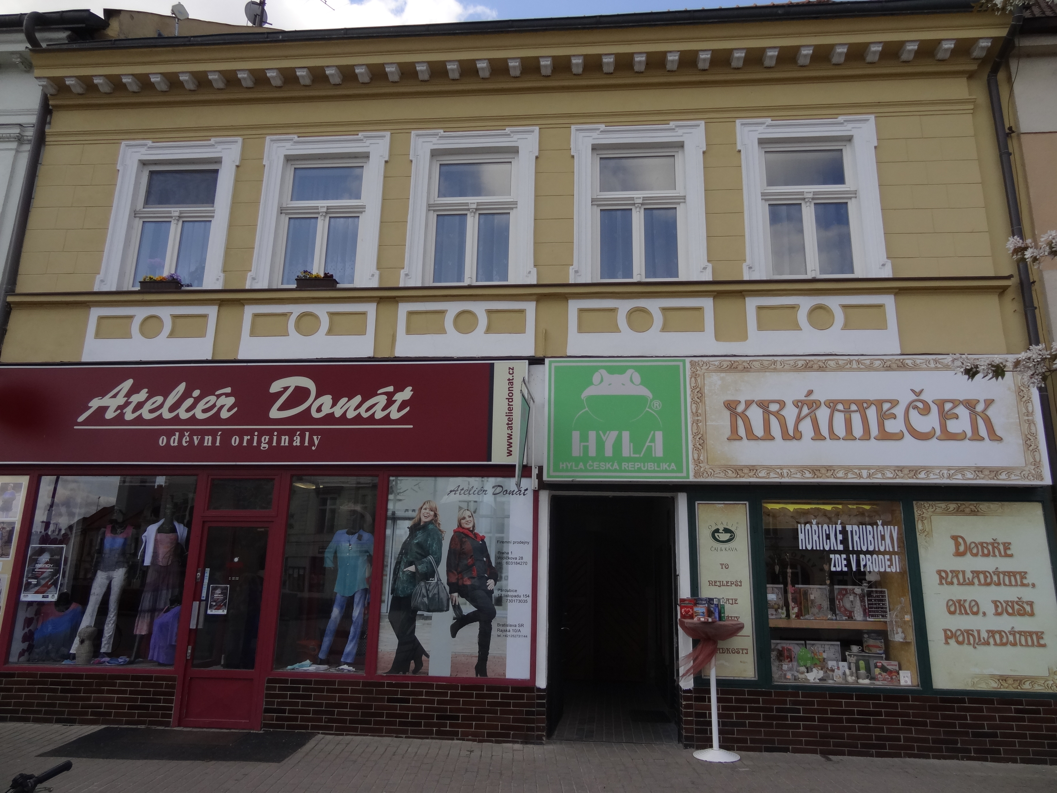 Měšťanský dům čp. 5, Jiřího náměstí 5/4, Poděbrady I, parcela st. 14/1, Poděbrady.